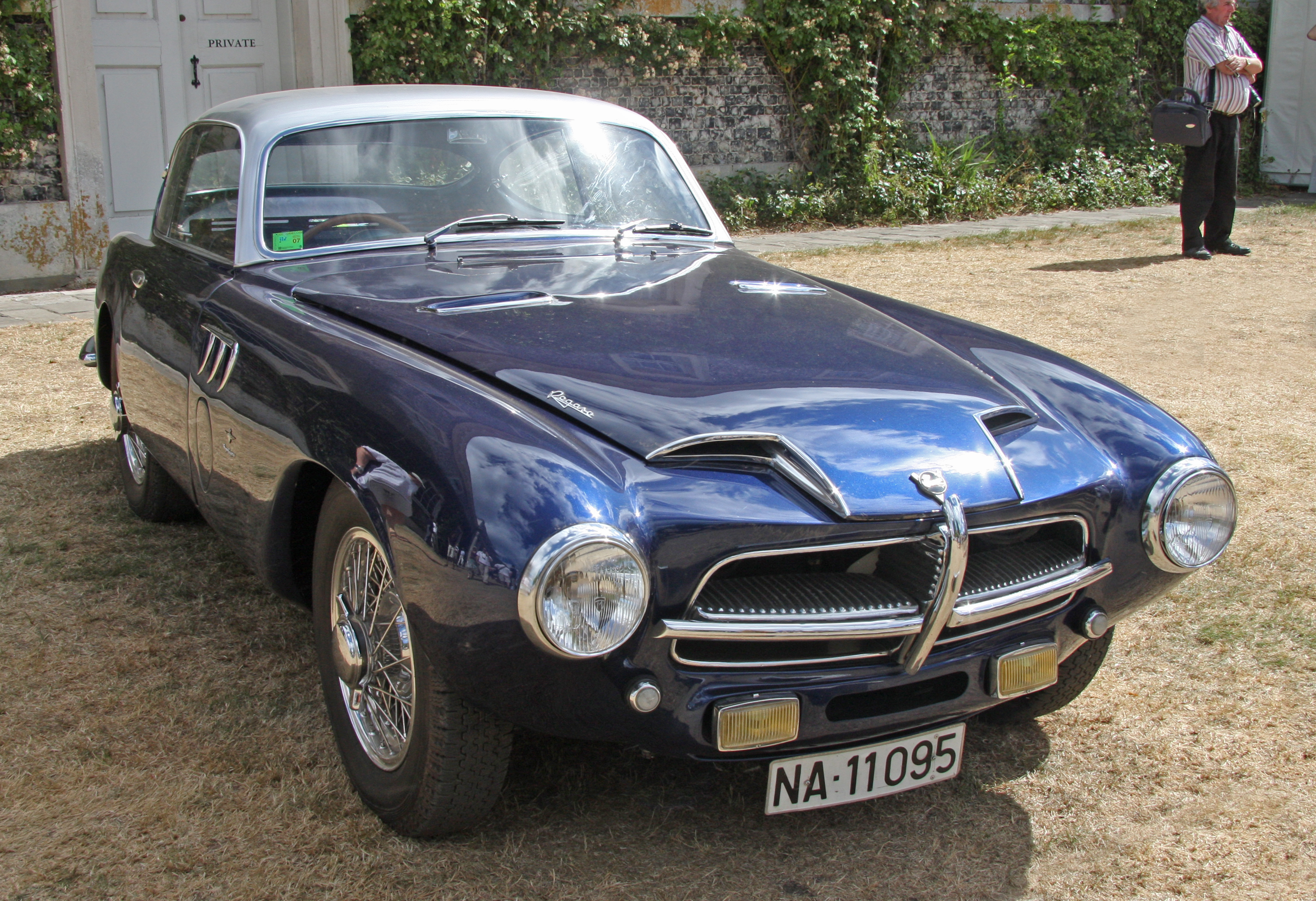 1955 Pegaso Z102B Berlineta Touring Serie 2